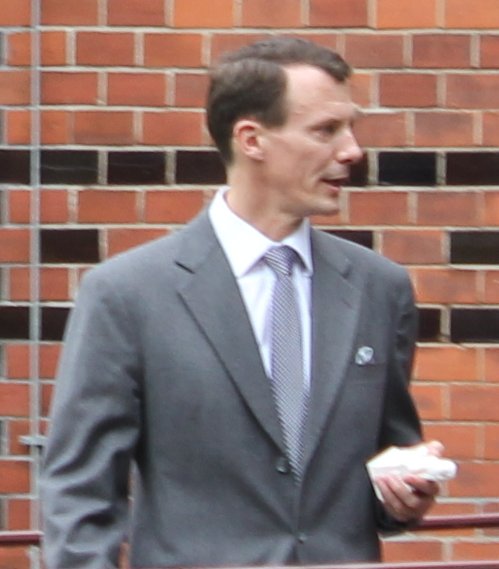 Prince Joachim of Denmark after visiting the Flensburg Lion exhibition in the Flensburg's Old Museum, with a wrapped porcelain lion souvenir in hand. (10 September 2011)